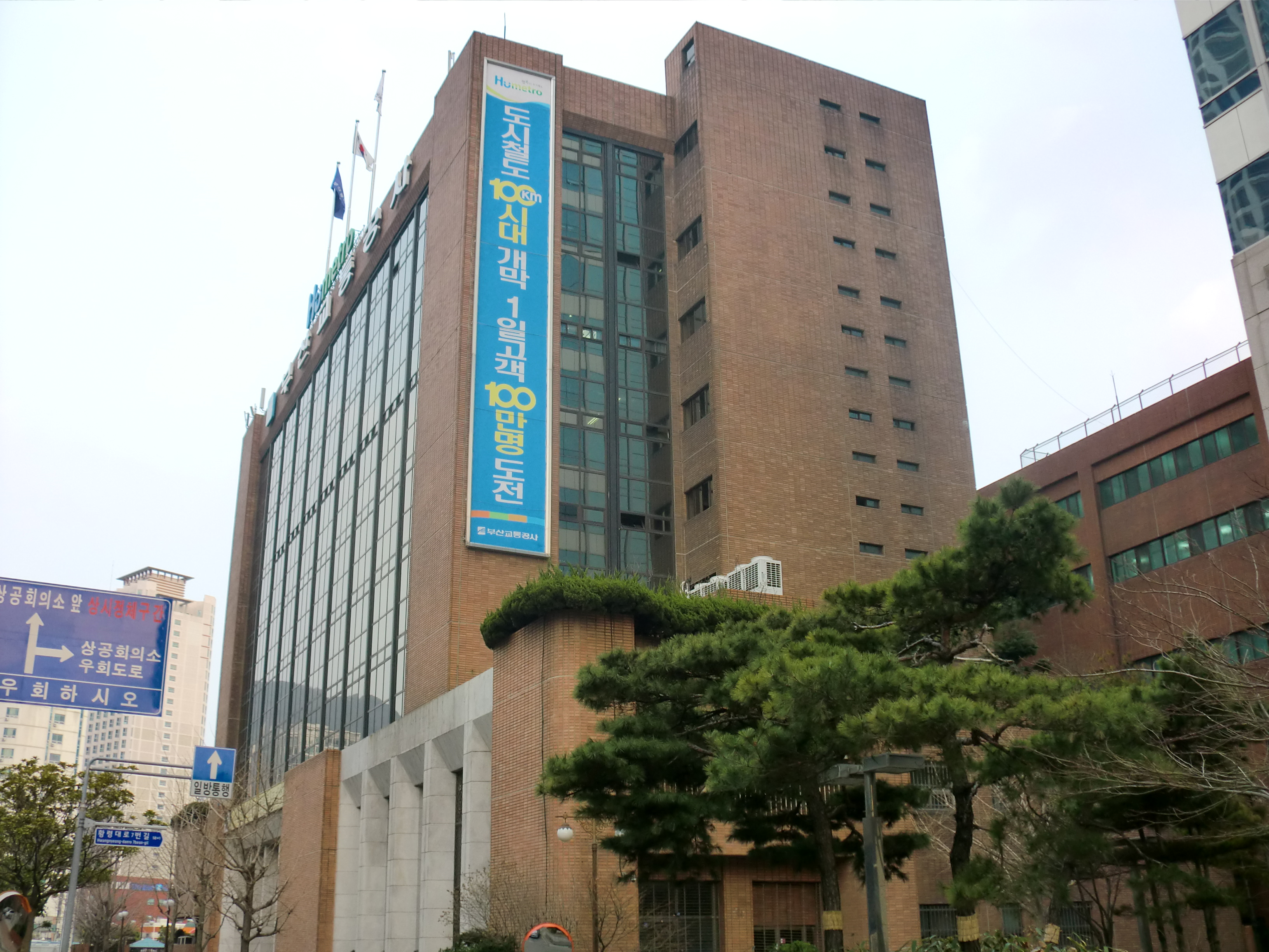 부산광역시 부산진구에 있는 부산교통공사 본사